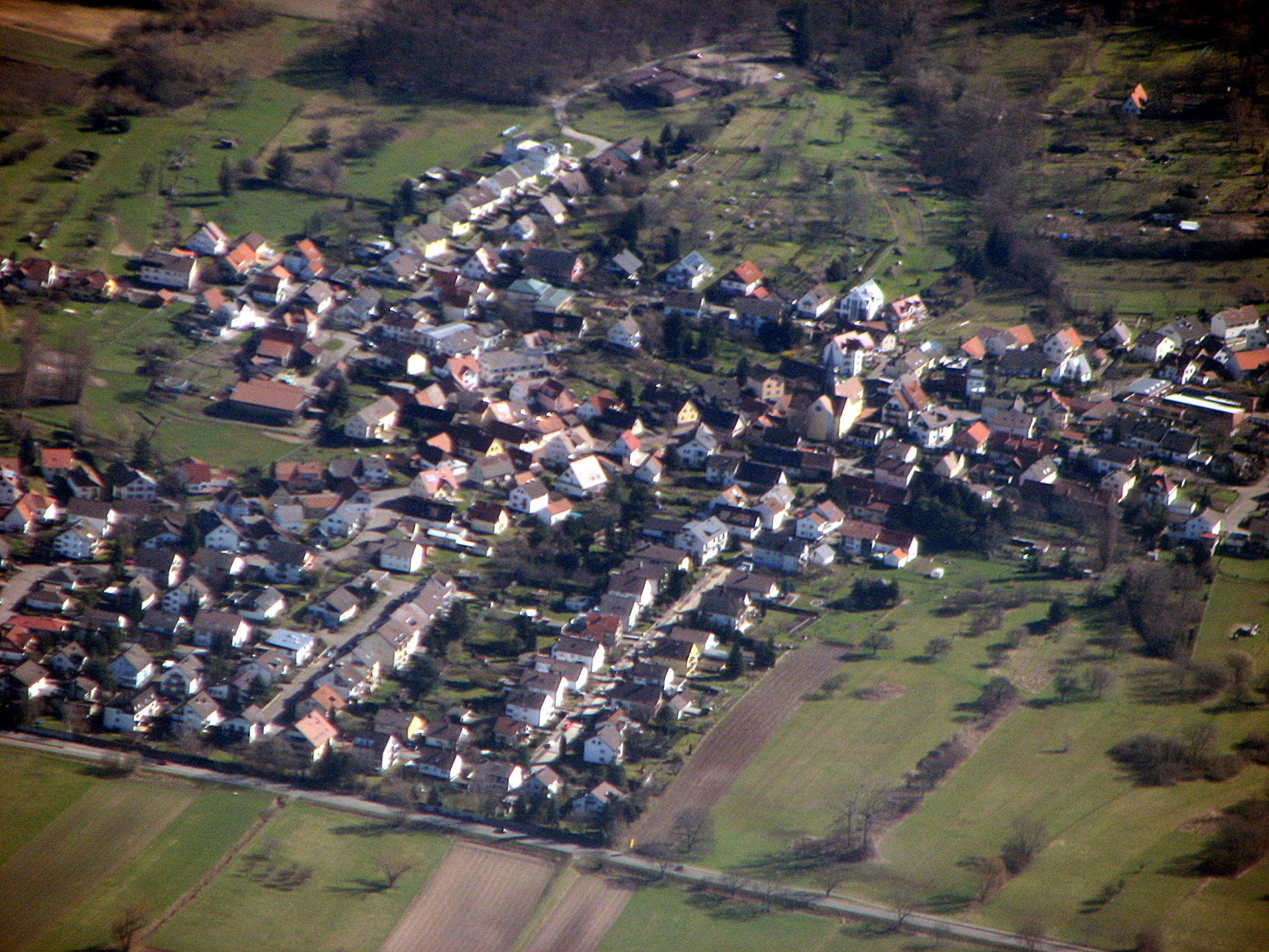 Oberweier bei Ettlingen aus dem Flugzeug aufgenommen. Die Farben des Bildes wurden digital aufbereitet.